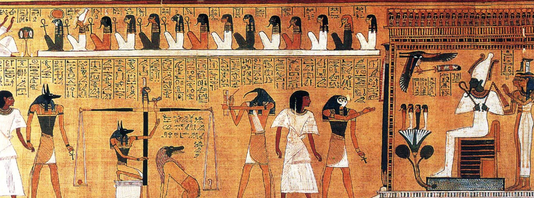 Le coeur de l'homme est mis sir une balance pour être pesé